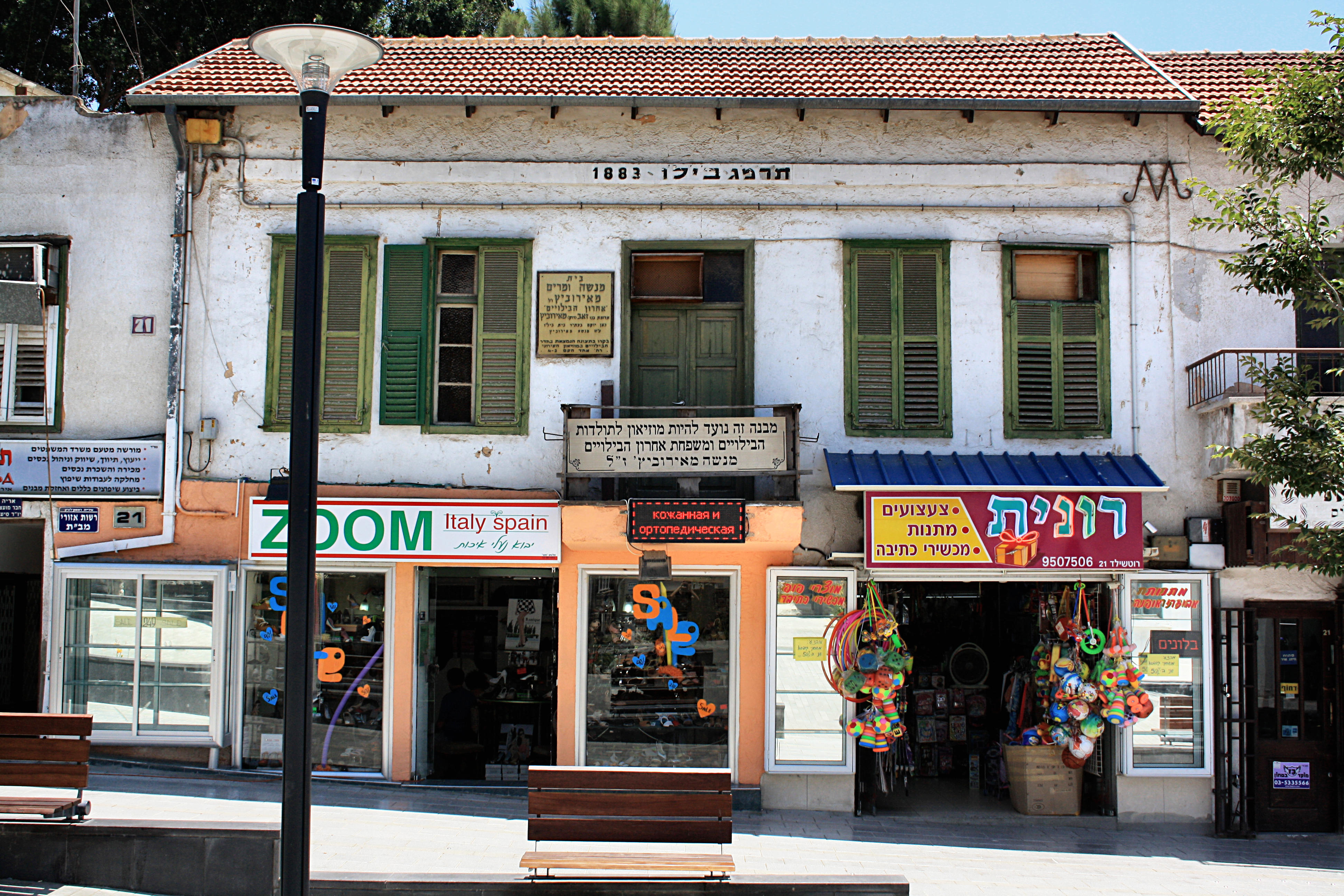 ביתו של מנשה מאירוביץ'.